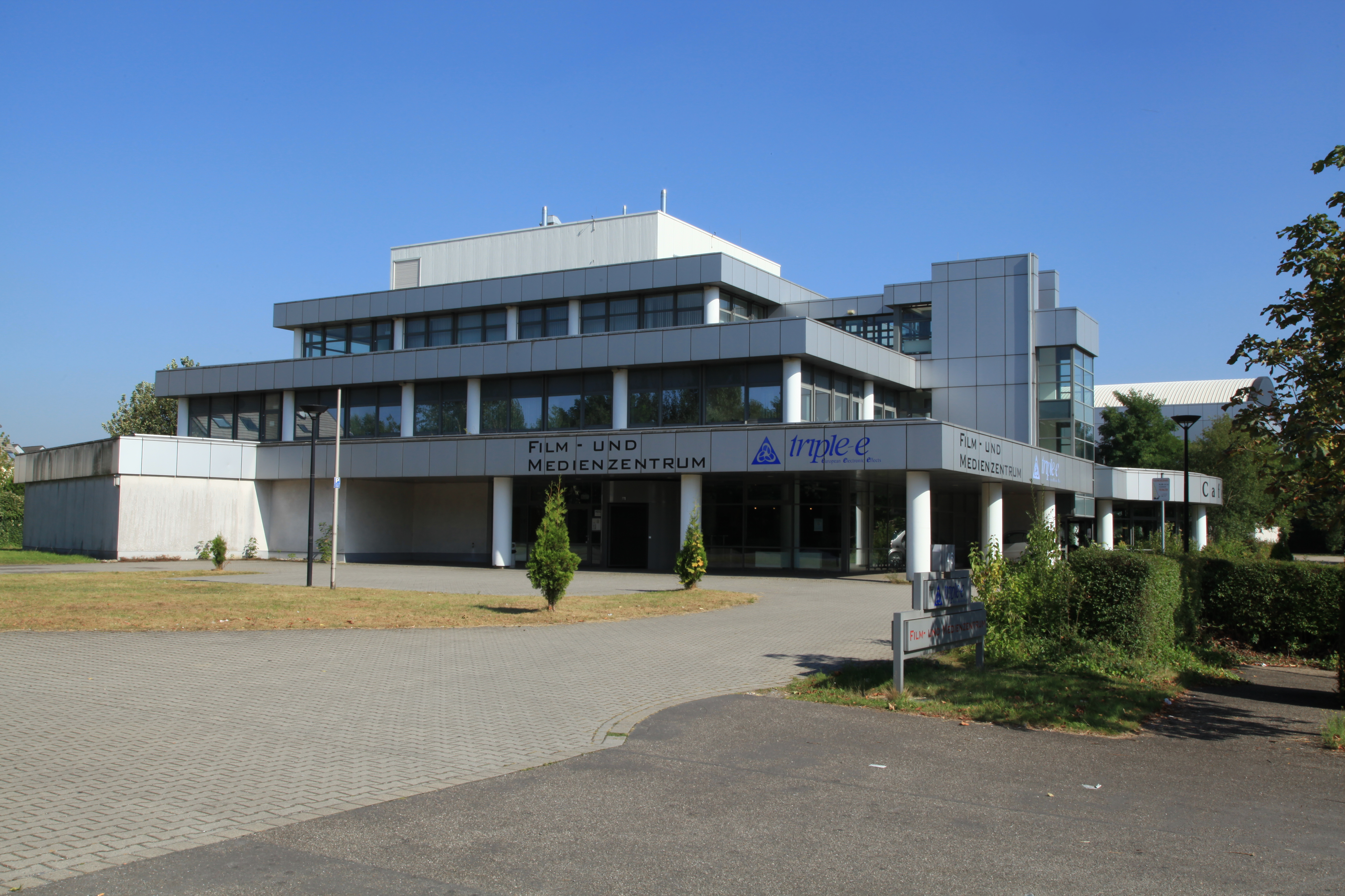 Film- und Medienzentrum triple-e auf dem ehemaligen Kraftwerksgelände der Zeche Osterfeld, Vestische Straße in Oberhausen